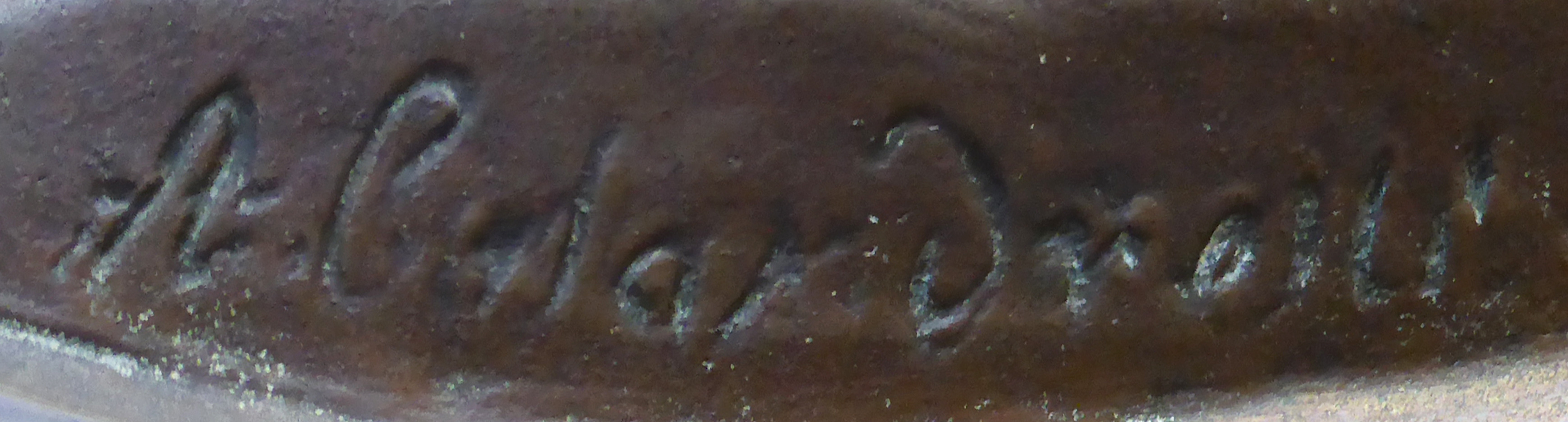 Signatur des Bildhauers Alexander Calandrelli am Reliefbild von Franz Schwechten im Deutschen Technikmuseum (Inventarnummer: VBM E-5010) in Berlin. Wikipedianische KulTour am 10. Oktober 2015 in der Ausstellung des Museums.